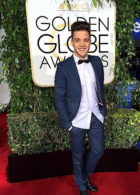 Luca Hänni Golden Globe 2015